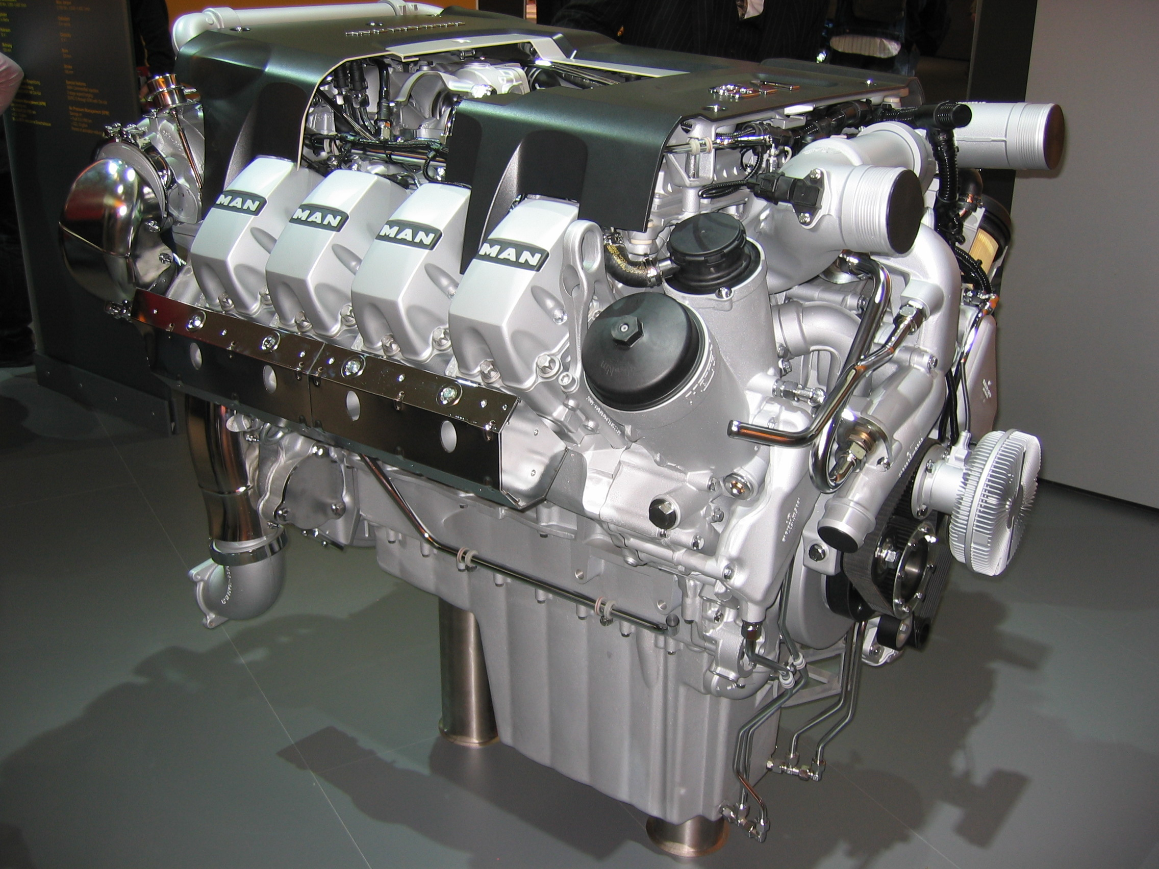 V8-Dieselmotor von MAN (Typ D2868LFxx)